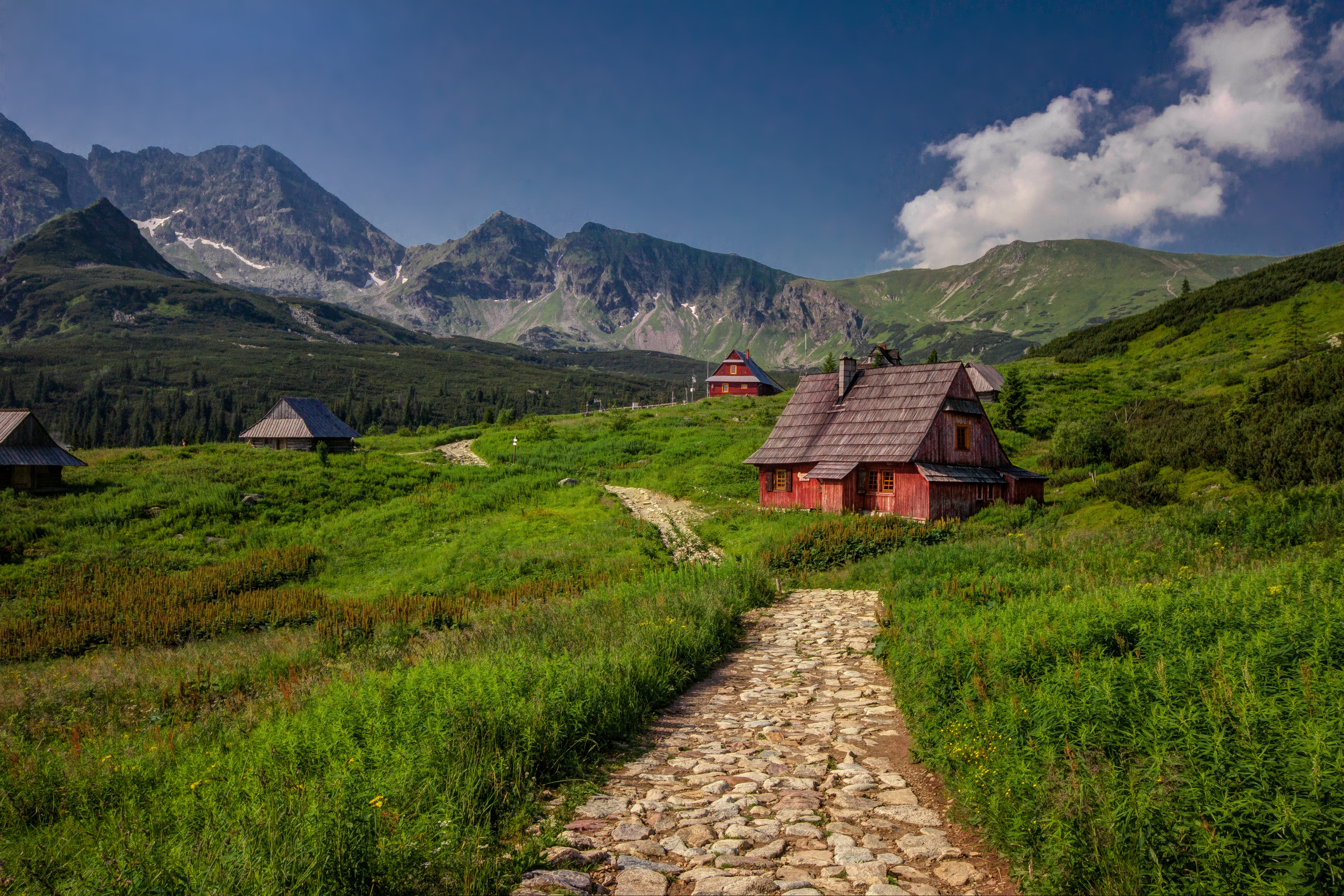 Specjalny obszar ochrony siedlisk Tatry. This is a photography of Natura 2000 protected area with ID PLC120001